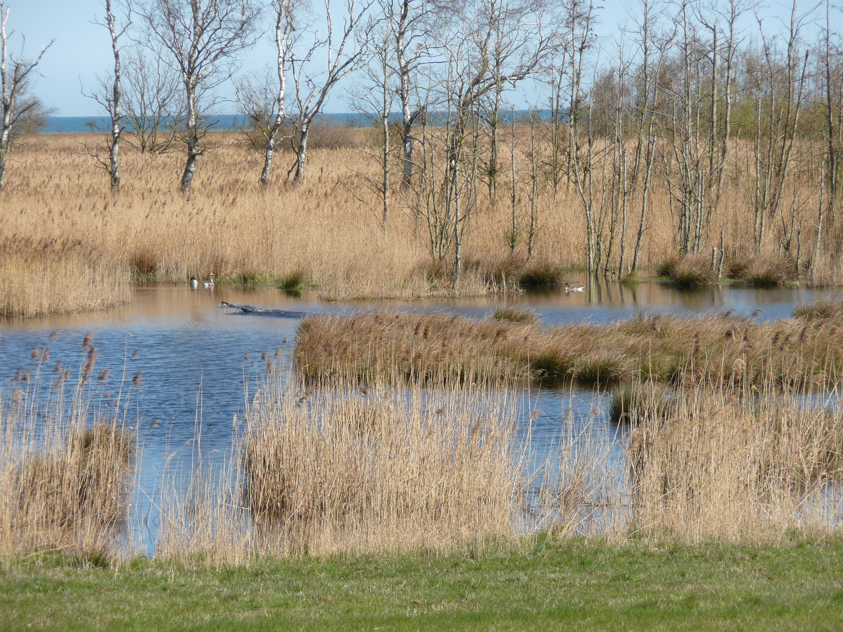 Pramort, Recknitz-Ästuar und Halbinsel Zingst